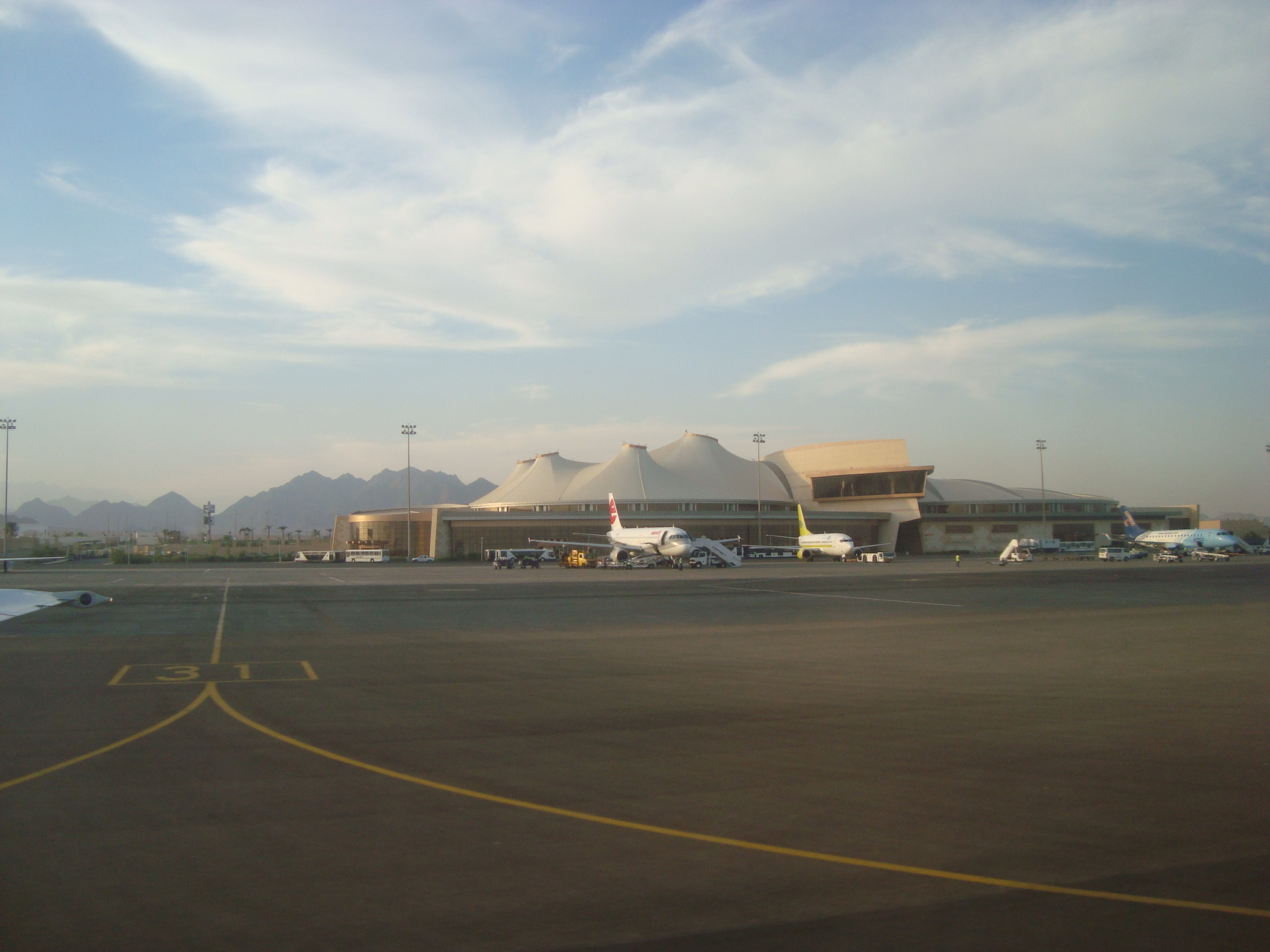 Аеропорт у м. Шарм-ель-Шейх, Єгипет. Термінал 1